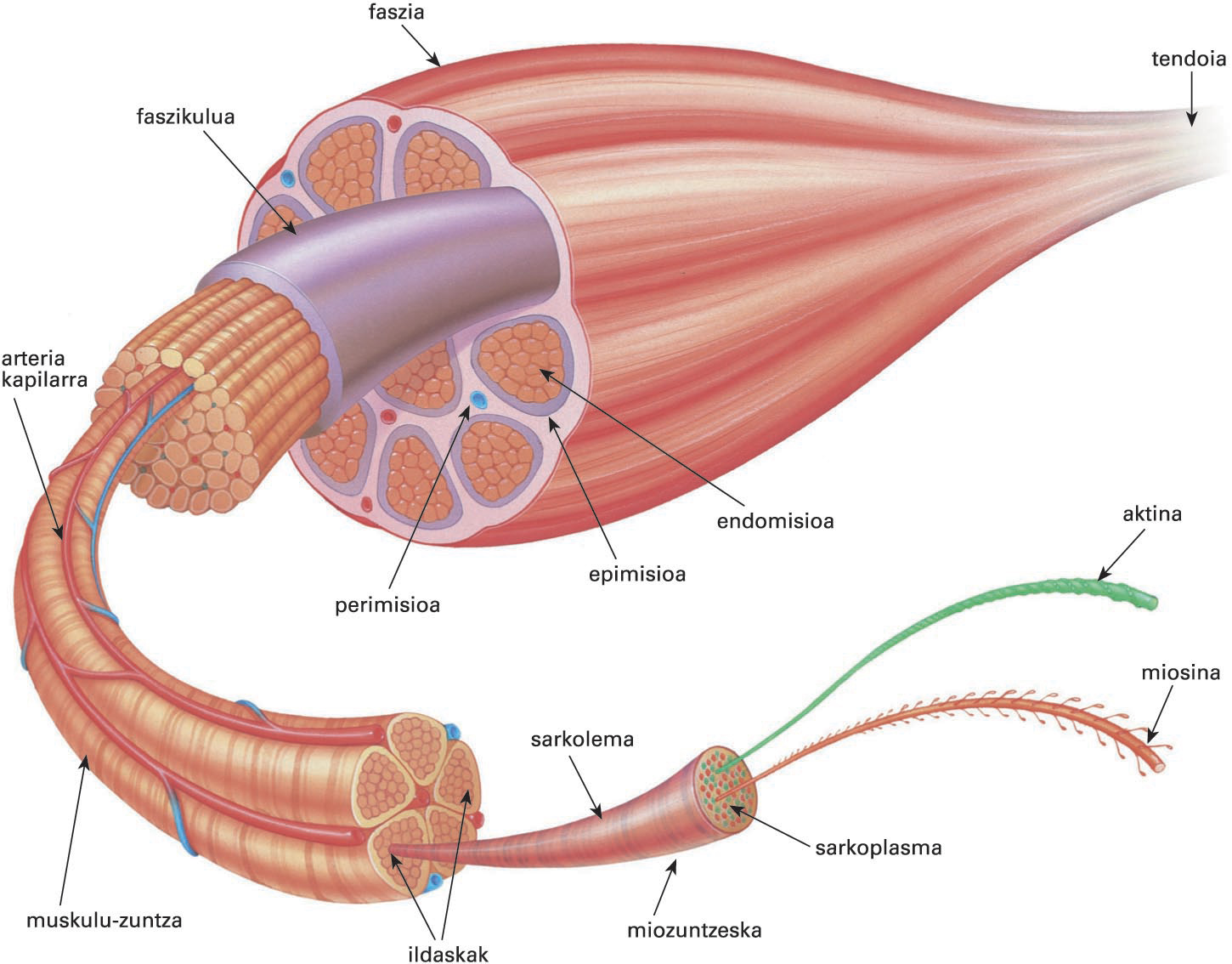 Muskulu ildaskatu baten eskema